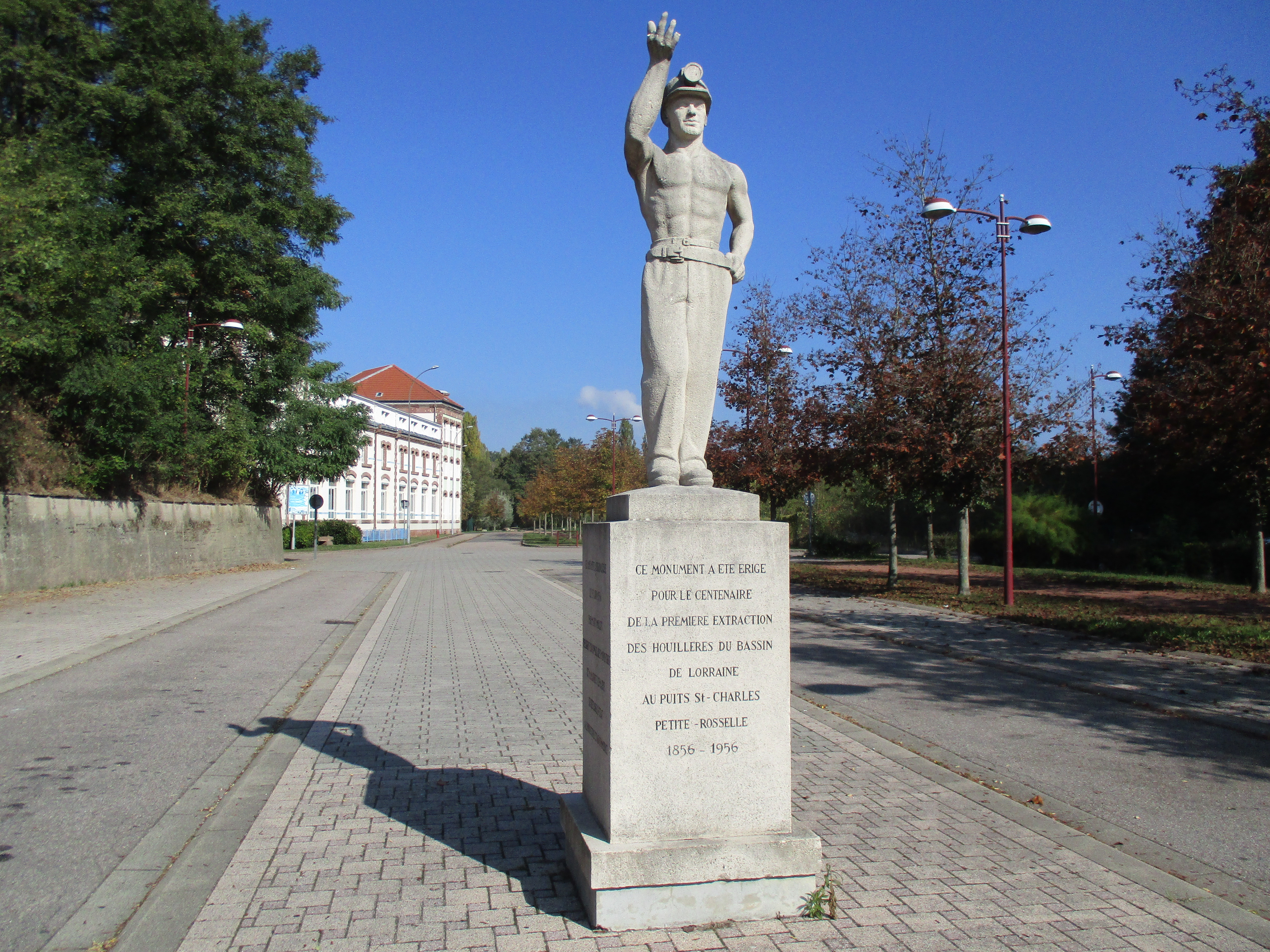 Monument sculpté par Janthial, érigé en 1956 pour le centenaire de la première extraction de charbon au Puits St. Charles.